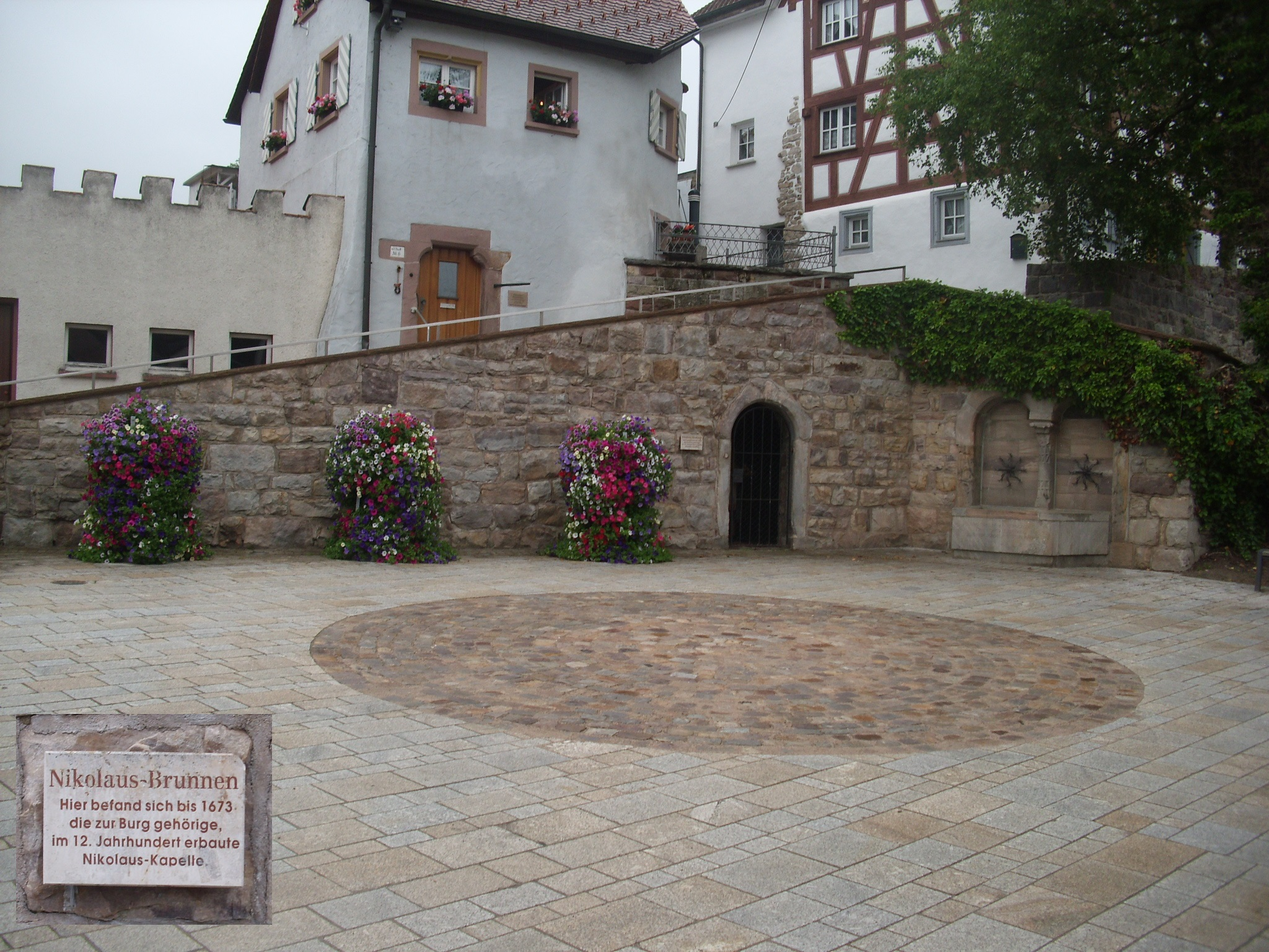 Bräunlingen - Schwarzwald-Baar-Kreis - Baden-Württemberg - Duitsland